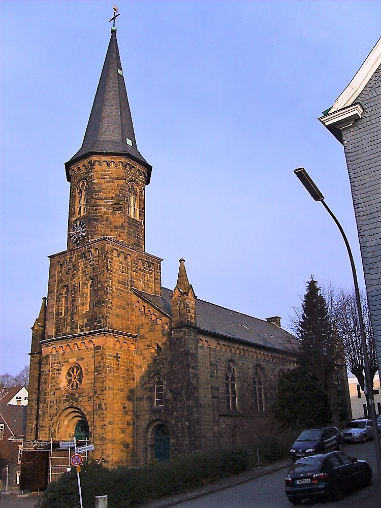 Reformierte Kirche, Ronsdorf, Wuppertal, Germany